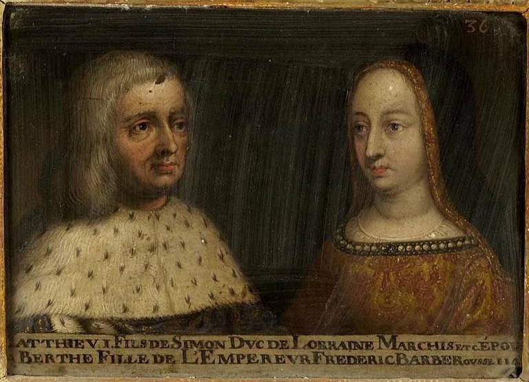 Portrait de Mathieu Ier, duc de Lorraine de 1139 à 1176, et de son épouse Berthe de Souabe. Ce tableau fait partie d'une suite d'une soixantaine de double-portraits représentant les ducs et duchesses de Lorraine ainsi que leurs ancêtres supposés. La légende est partiellement erronée car la duchesse Berthe est la sœur de Frédéric Barberousse. Musée des Offices, Florence (Inv. 1890, 616)